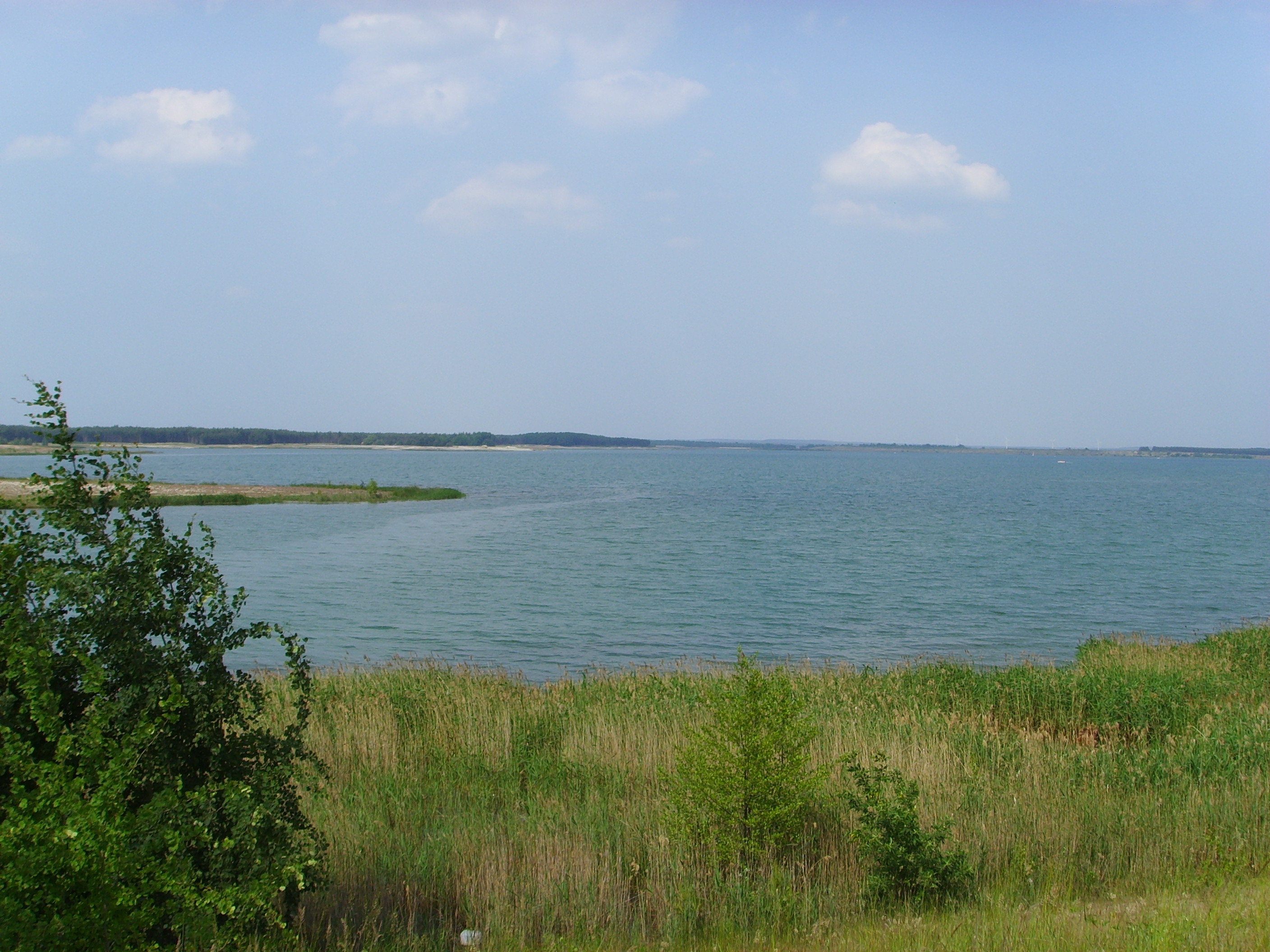 Geierswalder See Hornjoserbsce: Lejnjanski jězor